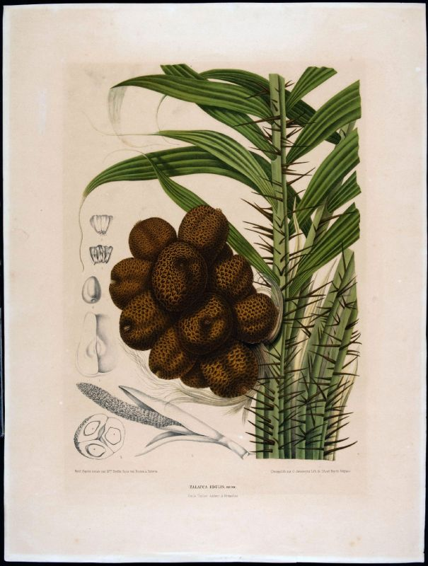 Litho. Het blad en de vrucht van de Zalacca edulis Reinw. Unknown language: Salak